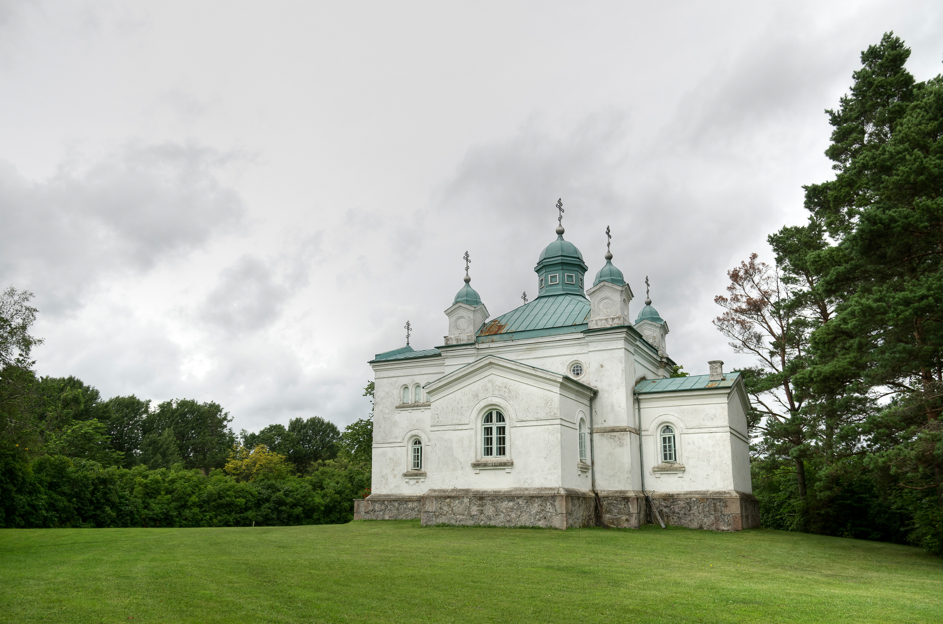 Reomäe Püha Andrease kirik, vaade lõunaküljelt